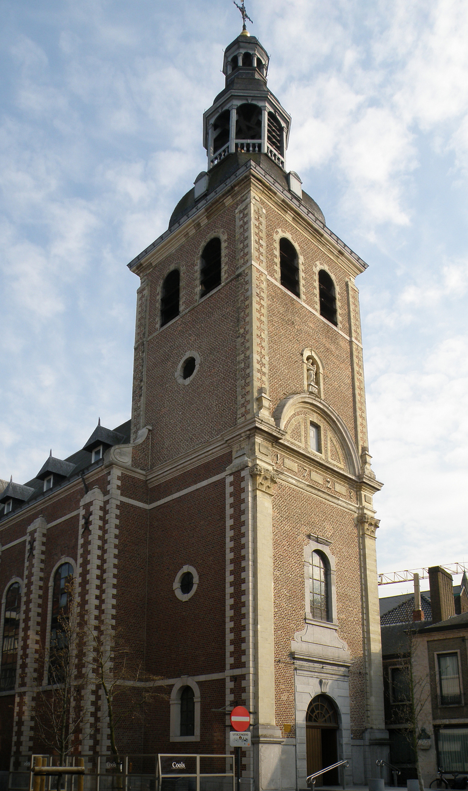 Hasselt (prov. Limburg, België). Virga Jessebasiliek, Kapelstraat.